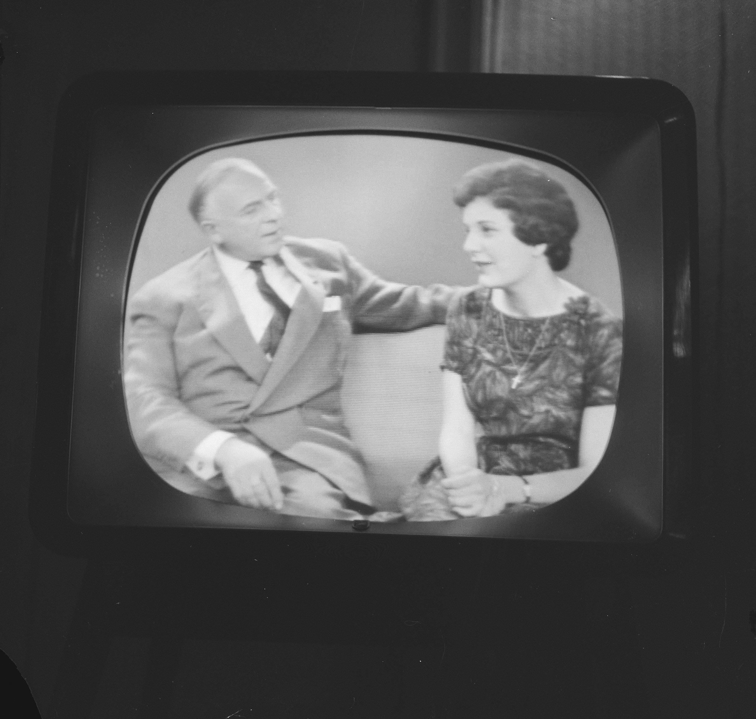 Collectie / Archief : Fotocollectie Anefo Reportage / Serie : [ onbekend ] Beschrijving : Anneke Beekman en Louis Frequin op de TV Datum : 1 december 1961 Persoonsnaam : Beekman, Anneke, Frequin, L.H.A. Fotograaf : Gelderen, Hugo van / Anefo Auteursrechthebbende : Nationaal Archief Materiaalsoort : Negatief (zwart/wit) Nummer archiefinventaris : bekijk toegang 2.24.01.03 Bestanddeelnummer : 913-2475